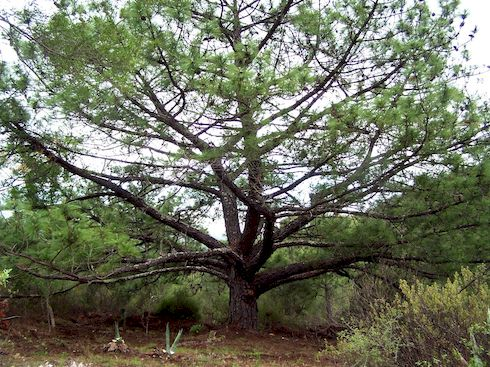 Pino centenario - Iturbide, Nuevo León, México